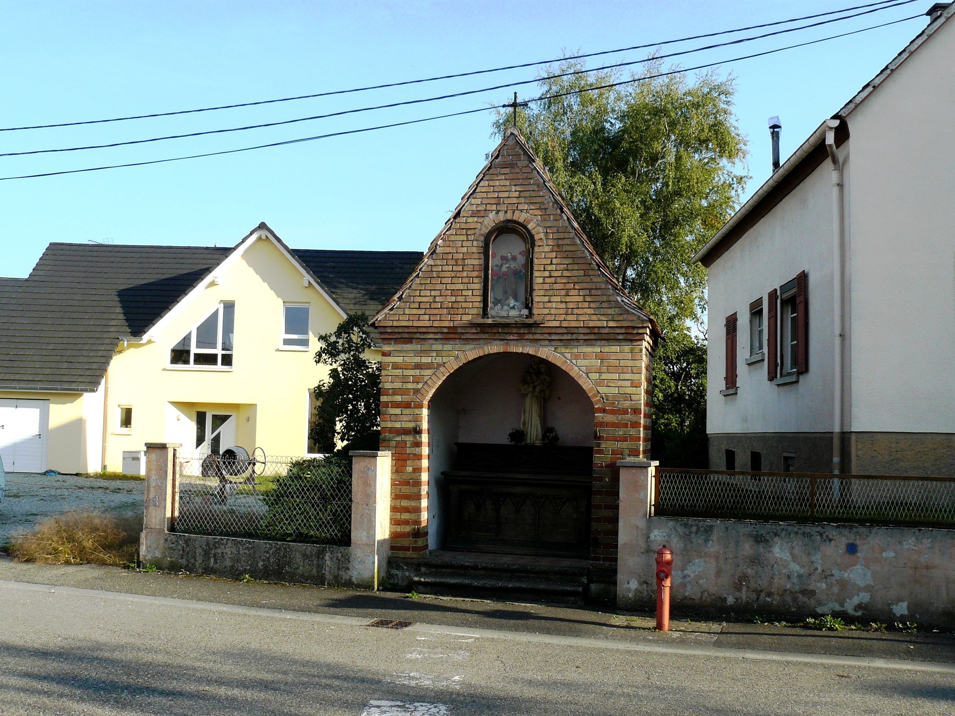 Petit oratoire situé dans le village de Friesenheim